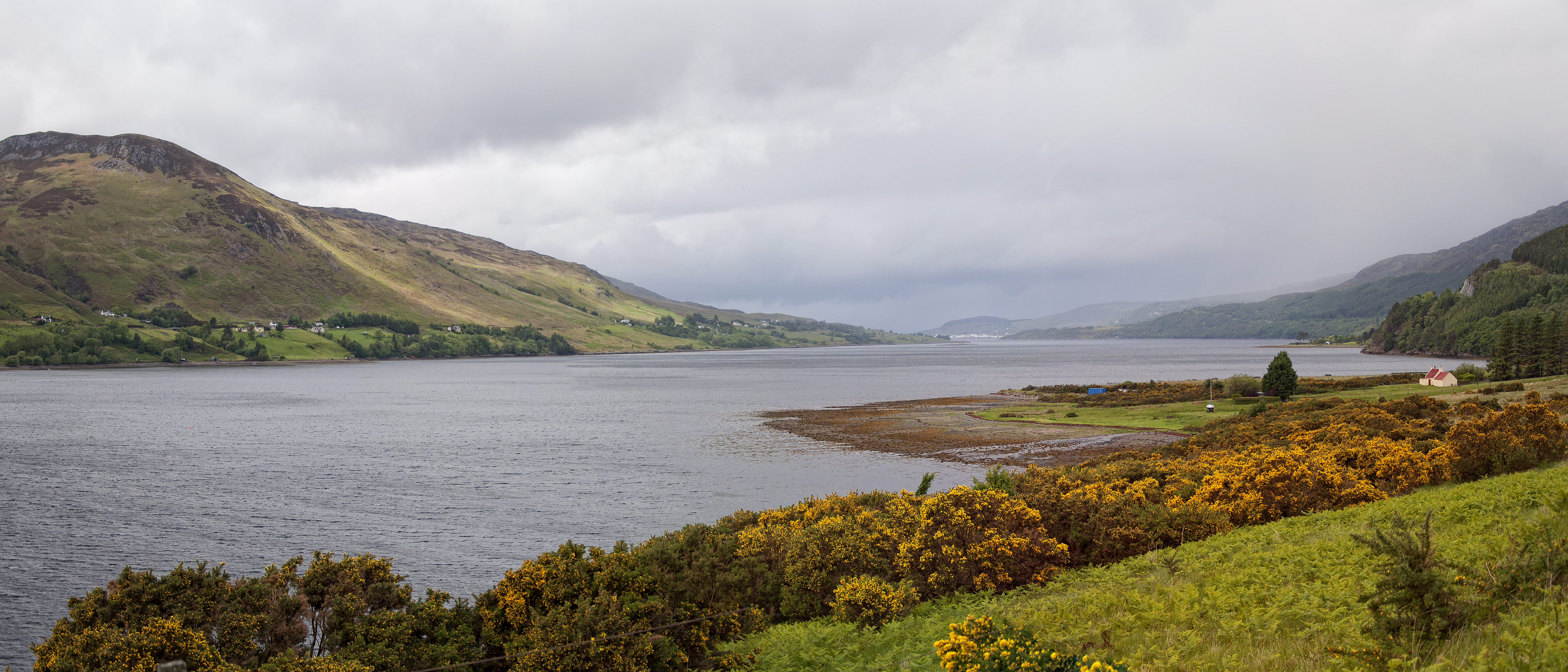 Loch Broom vanaf het zuiden met Ullapool in de achtergrond